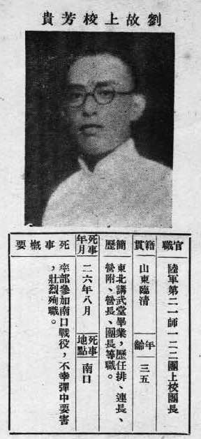 抗戰軍人忠烈錄第一輯中的烈士遺像